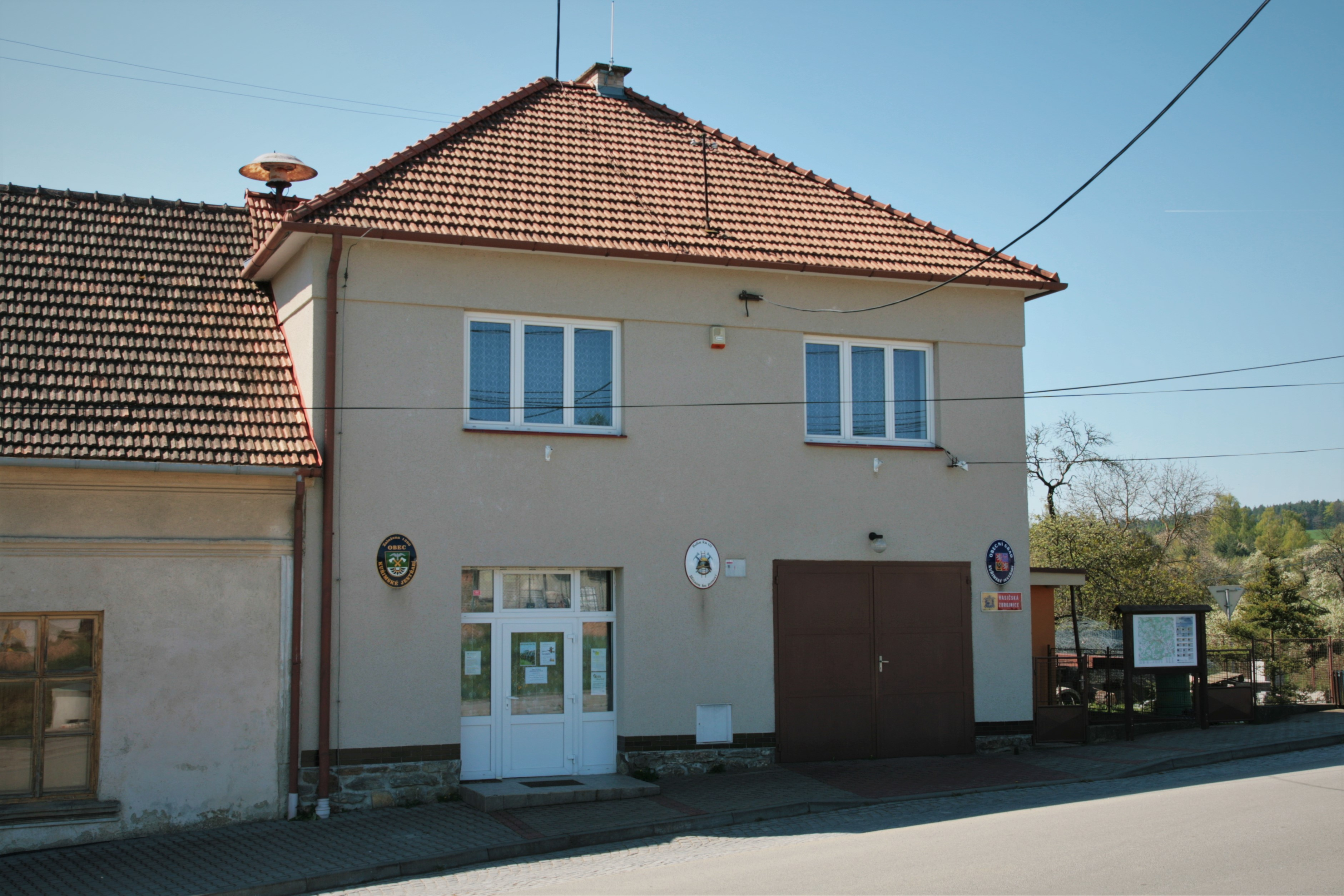 Obec Kuřimské Jestřabí v okrese Brno-venkov. Obecní úřad s hasičskou zbrojnicí.